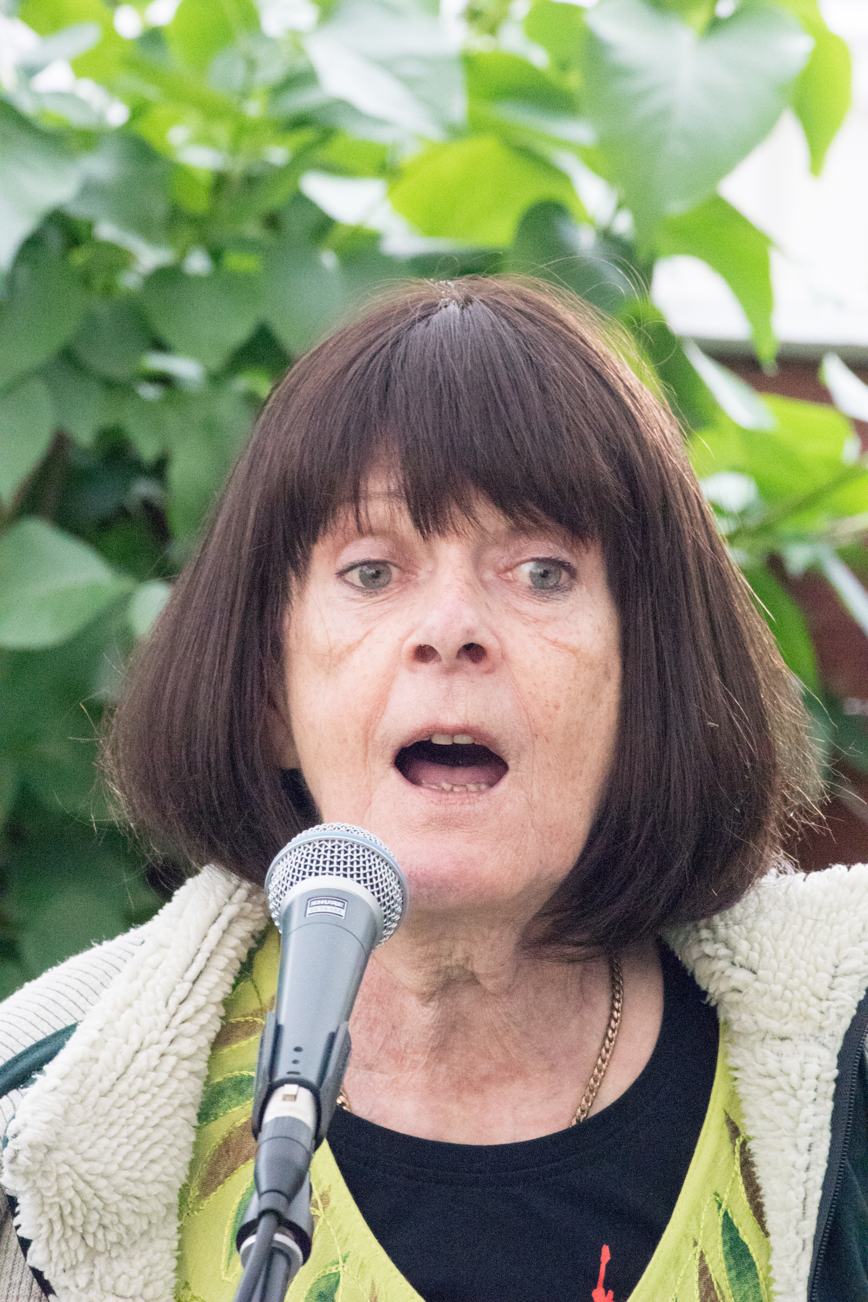 Päivi paunu suomalainen laulaja